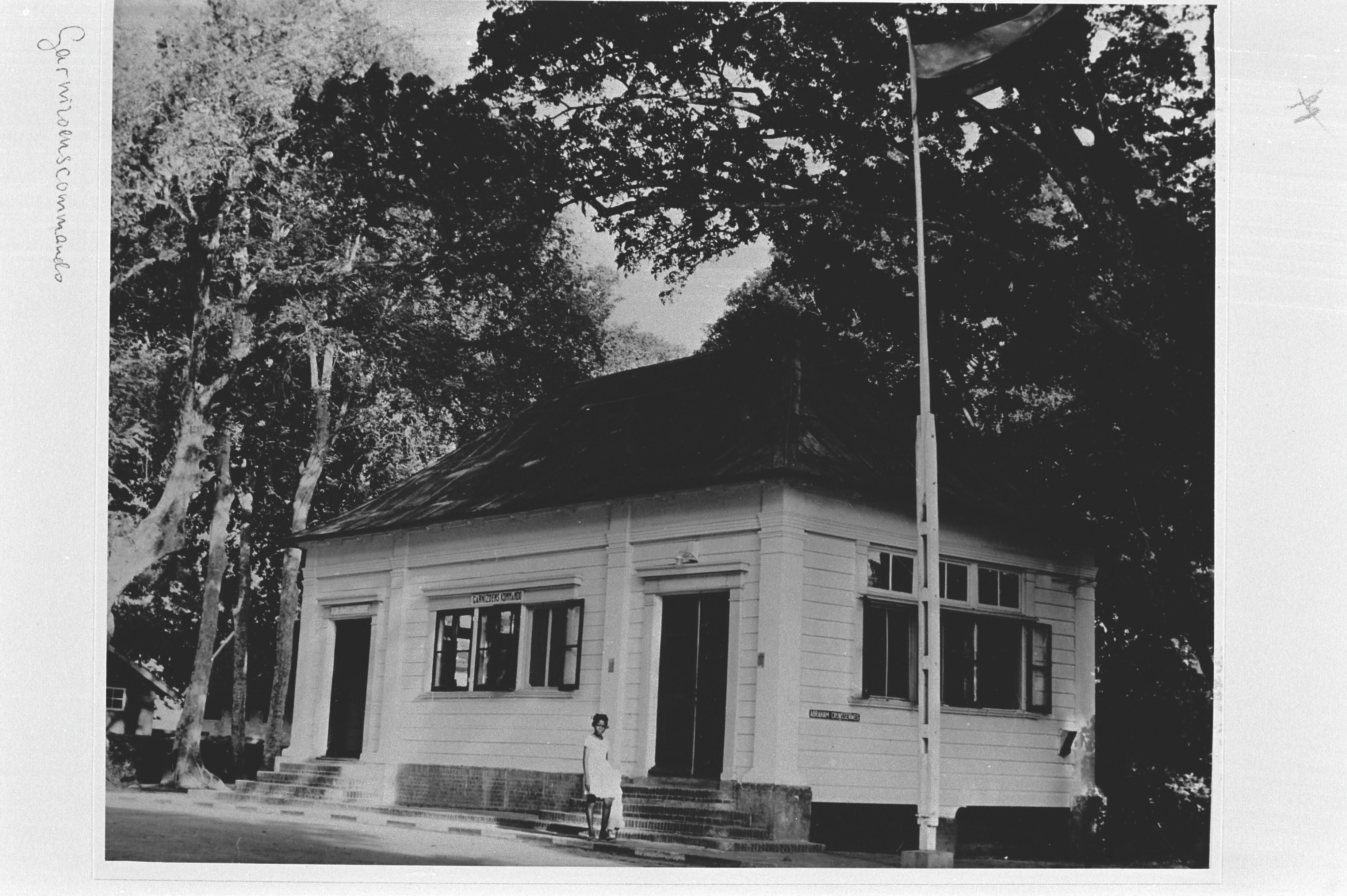 Fort Zeelandia, wachthuisOnderwerp: wachthuizen, forten